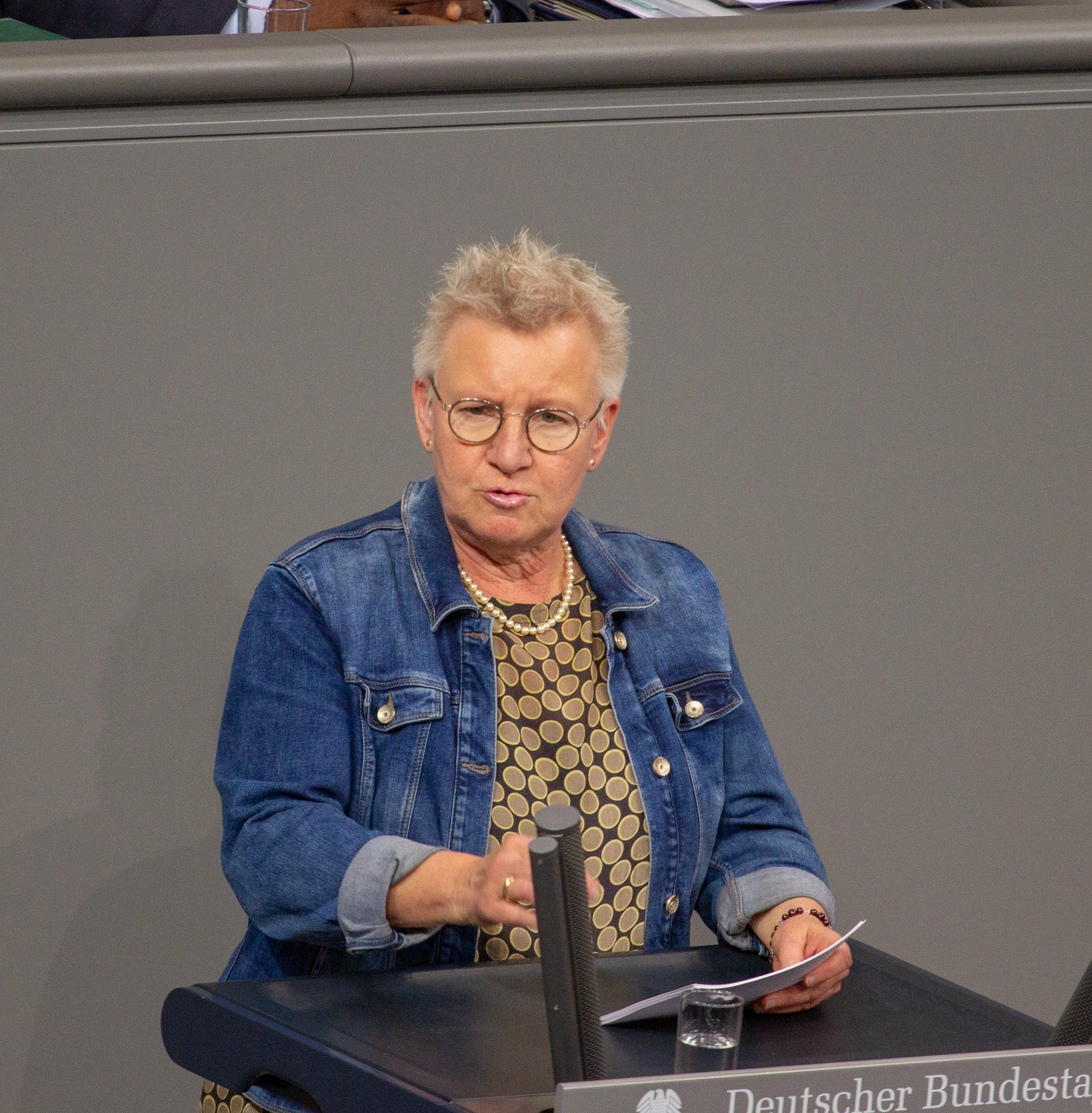 Jutta Krellmann, Mitglied des Deutschen Bundestages, während einer Plenarsitzung am 11. April 2019 in Berlin.